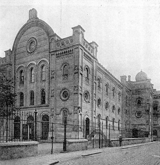 Velká synagoga v Brně, dnes ulice Spálená